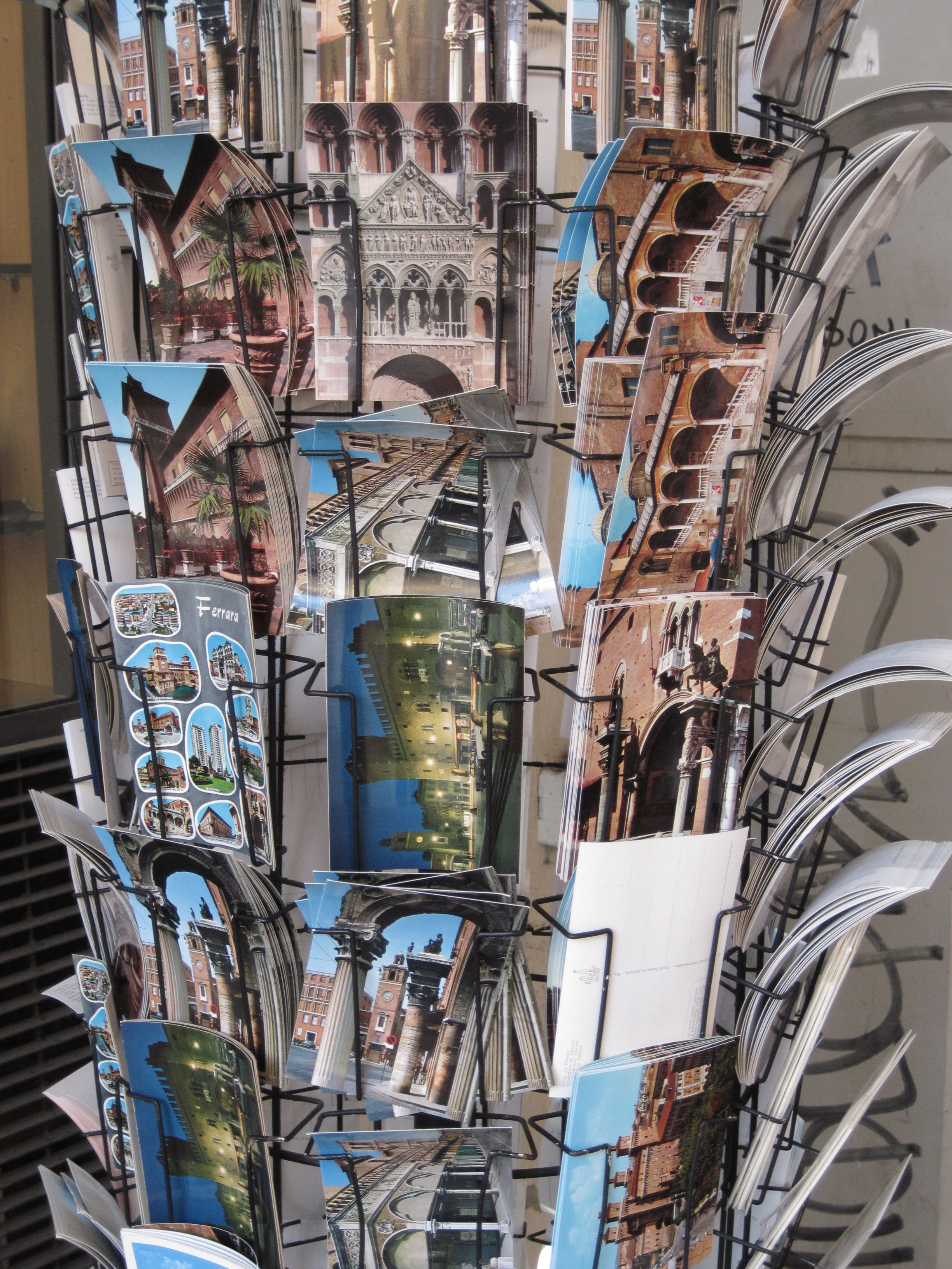 Cartoline con immagini della città in vendita davanti ad un negozio - Ferrara